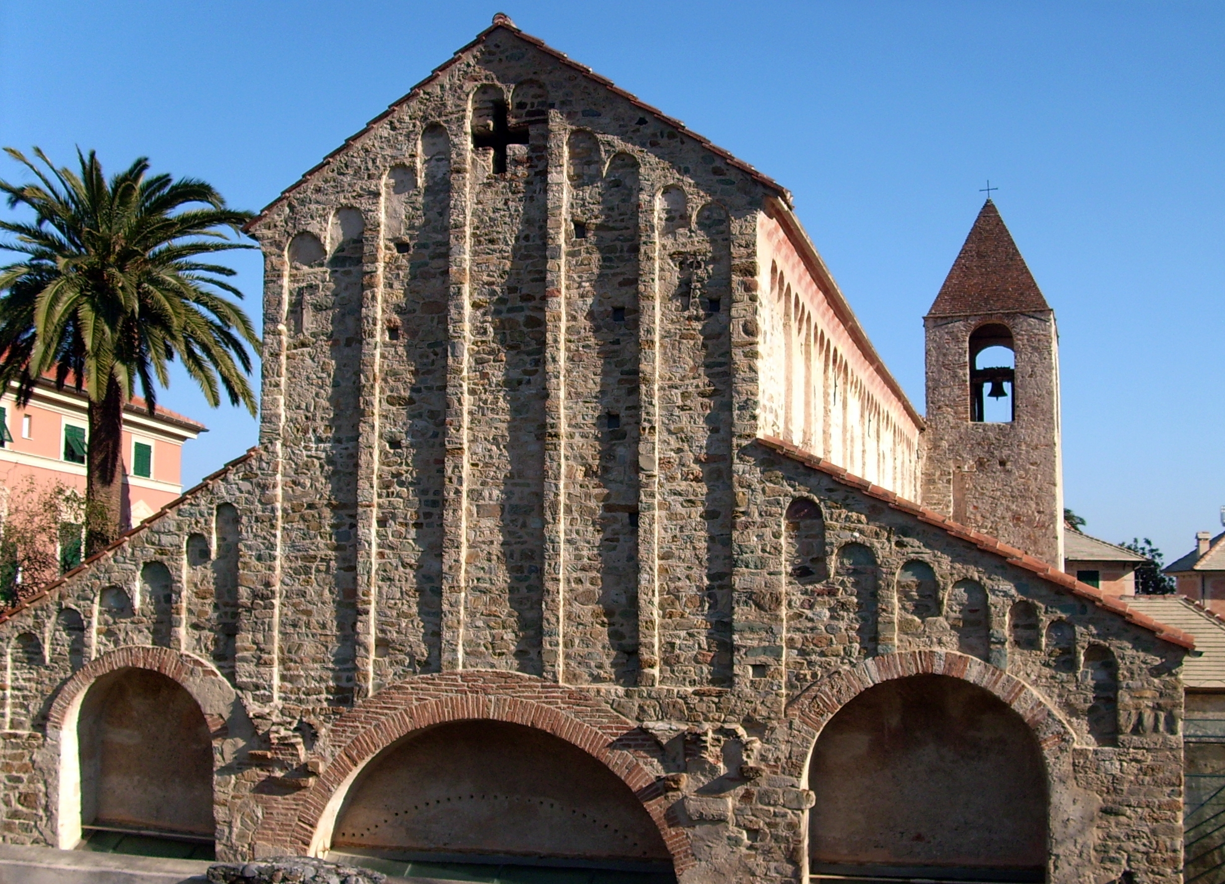 Cattedrale di San Paragorio di Noli, Liguria, Italy